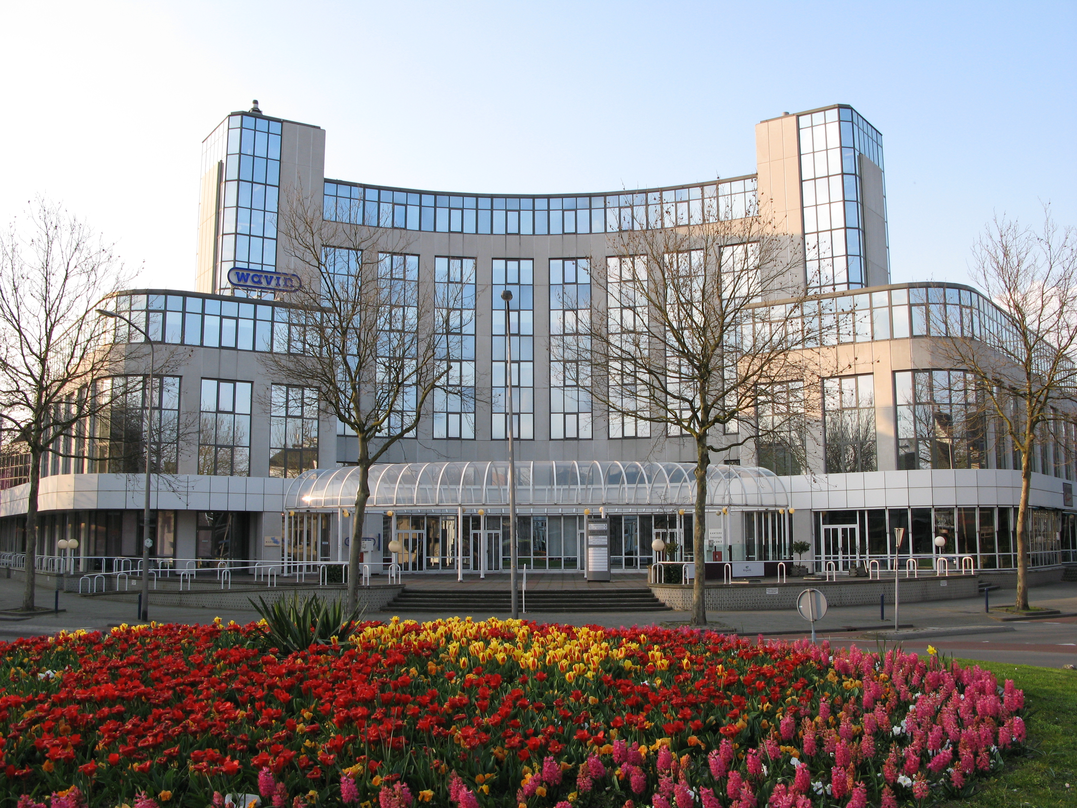 Nieuwe Buitensociëteit Zwolle